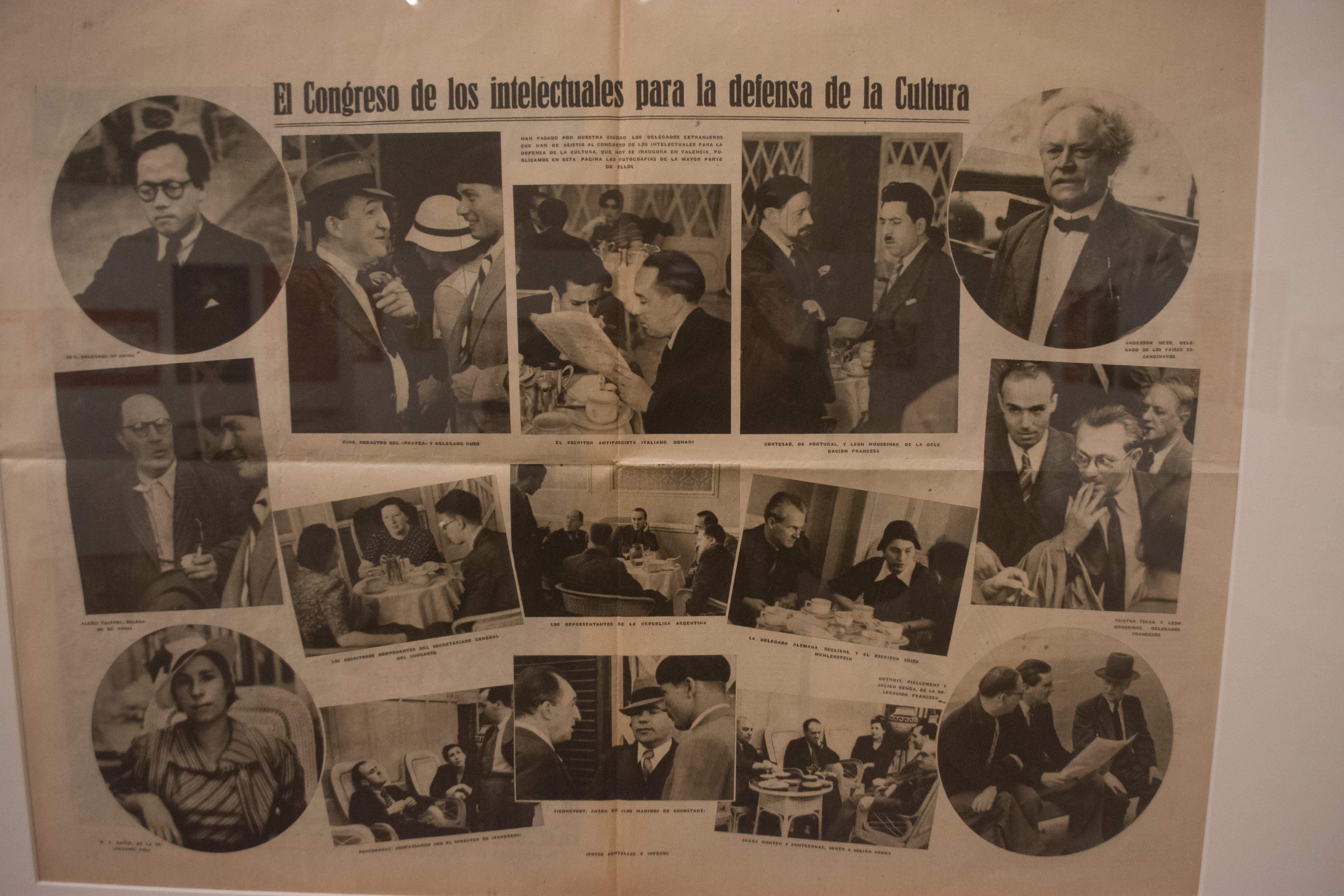 Noticias relativas al Congreso de intelectuales para la defensa de la República Española. Exposición Por la defensa de la Cultura en el Centro del Carmen de Valencia.